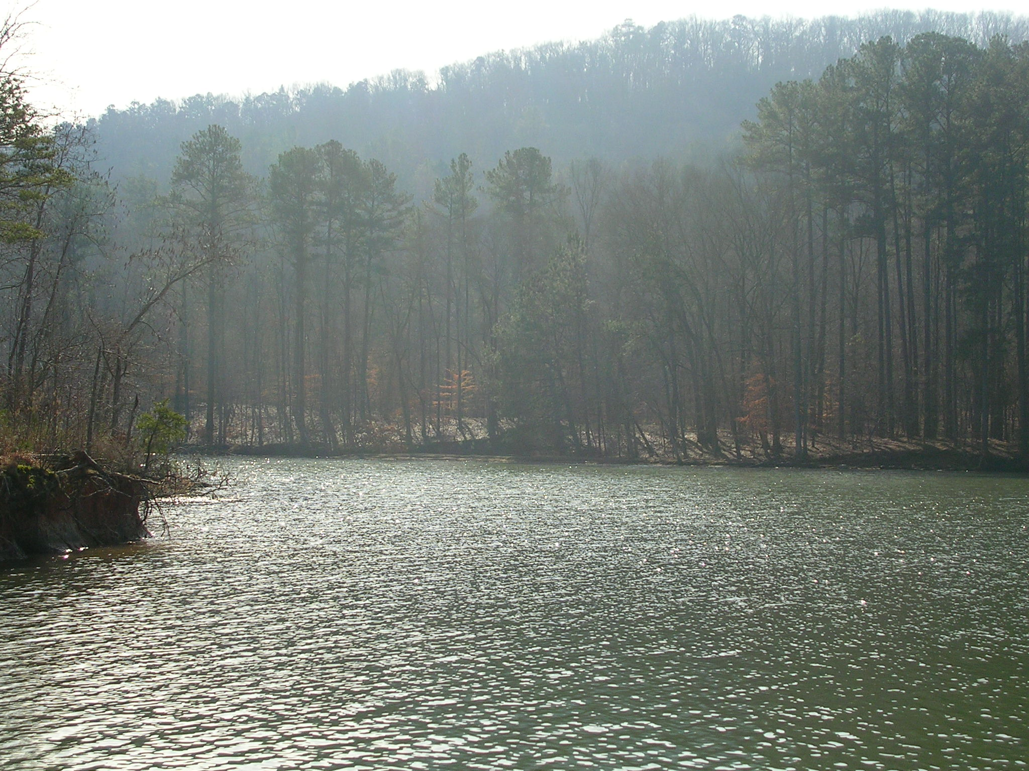 Lake Guntersville State Park, Alabama